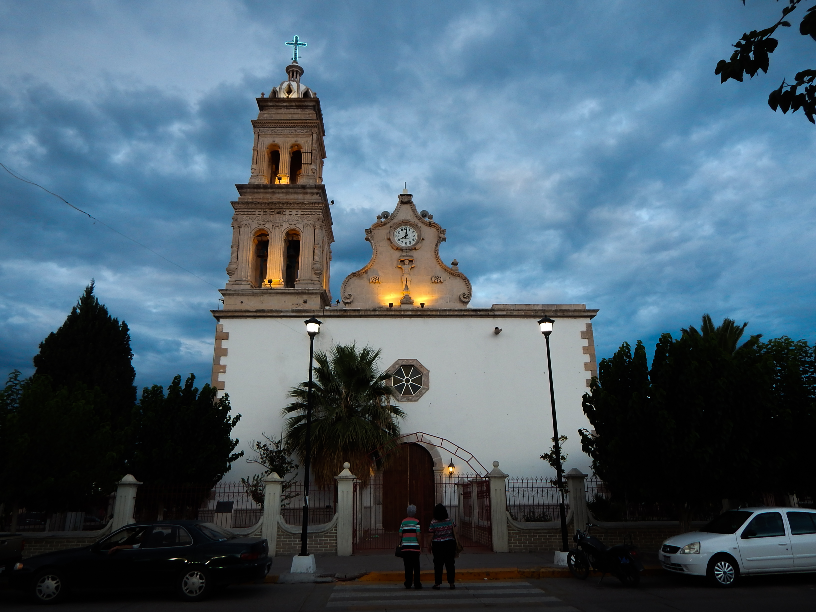 Un par de mujeres observan con amor la catedral de Meoqui, en Chihuahua.